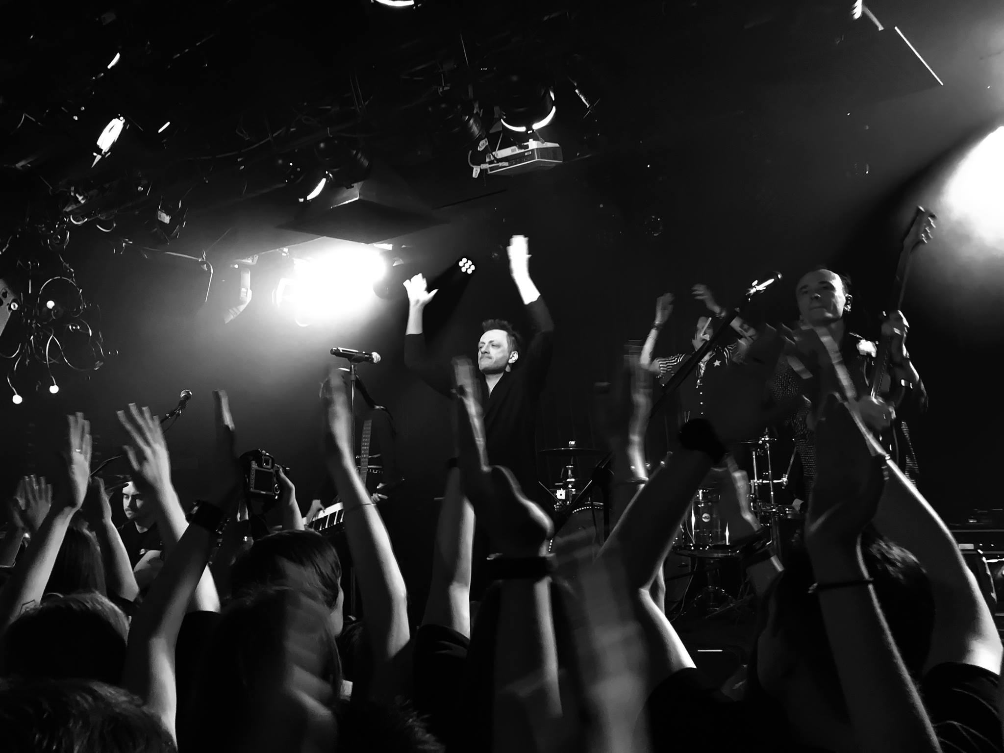 Глеб Самойлов. 19 января 2019 года.